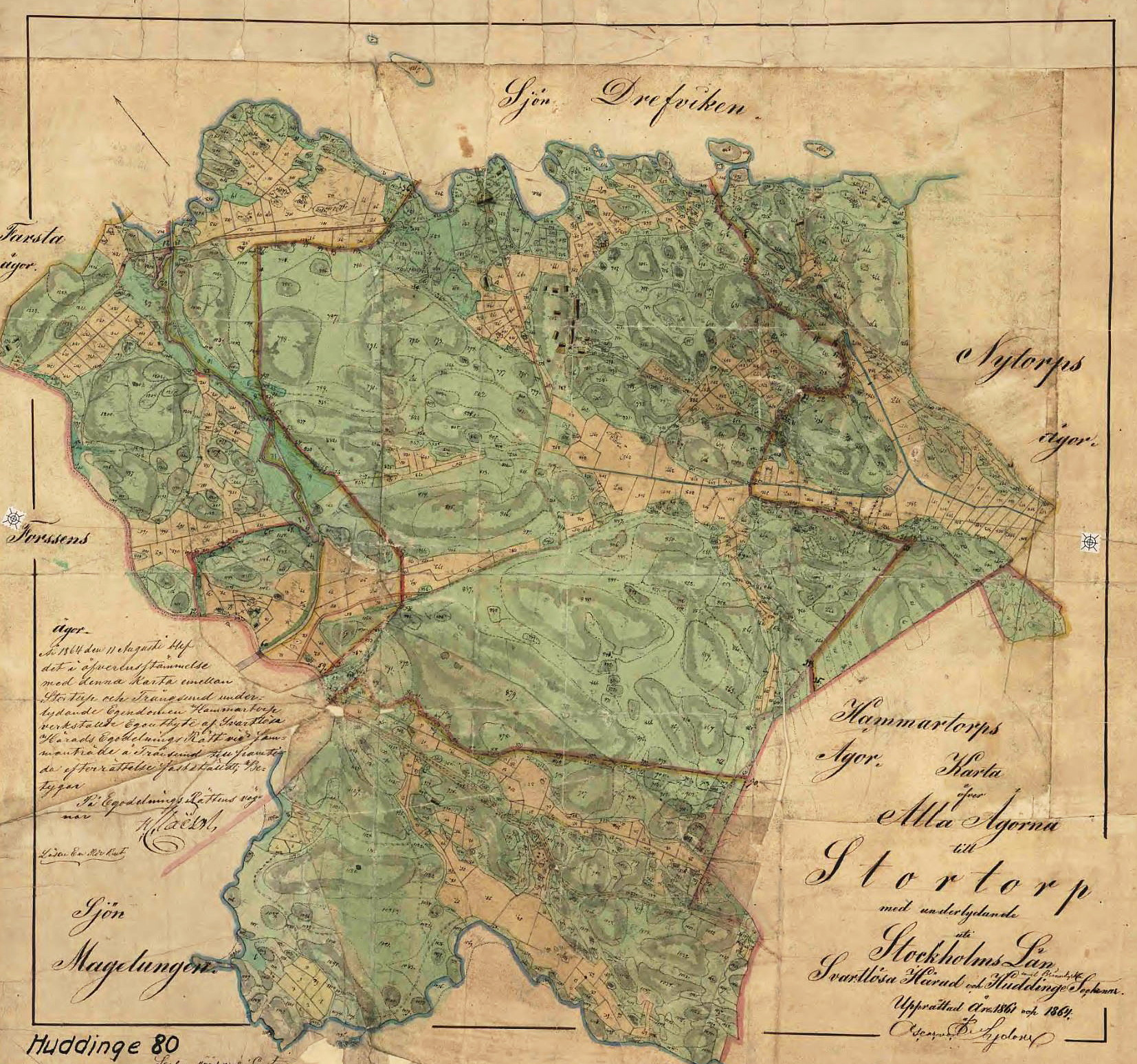 Karta över alla ägorna till Stortorp